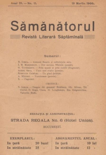 Sămănătorul first page - issue no. 50, dated March 13, 1905